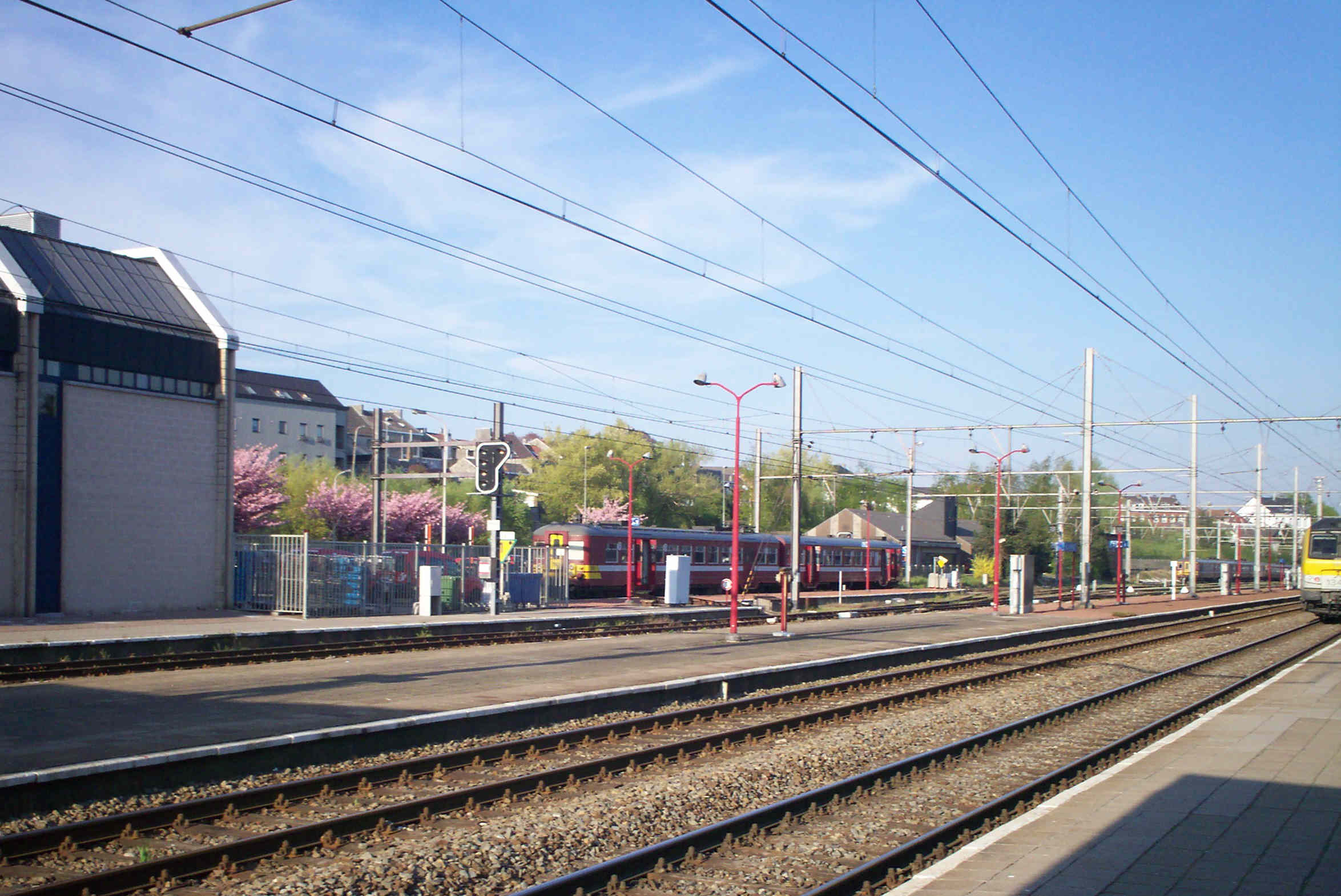 Gare de Welkenraedt/Station Welkenraat